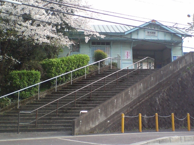 学文路駅 2007年4月6日 投稿者が撮影